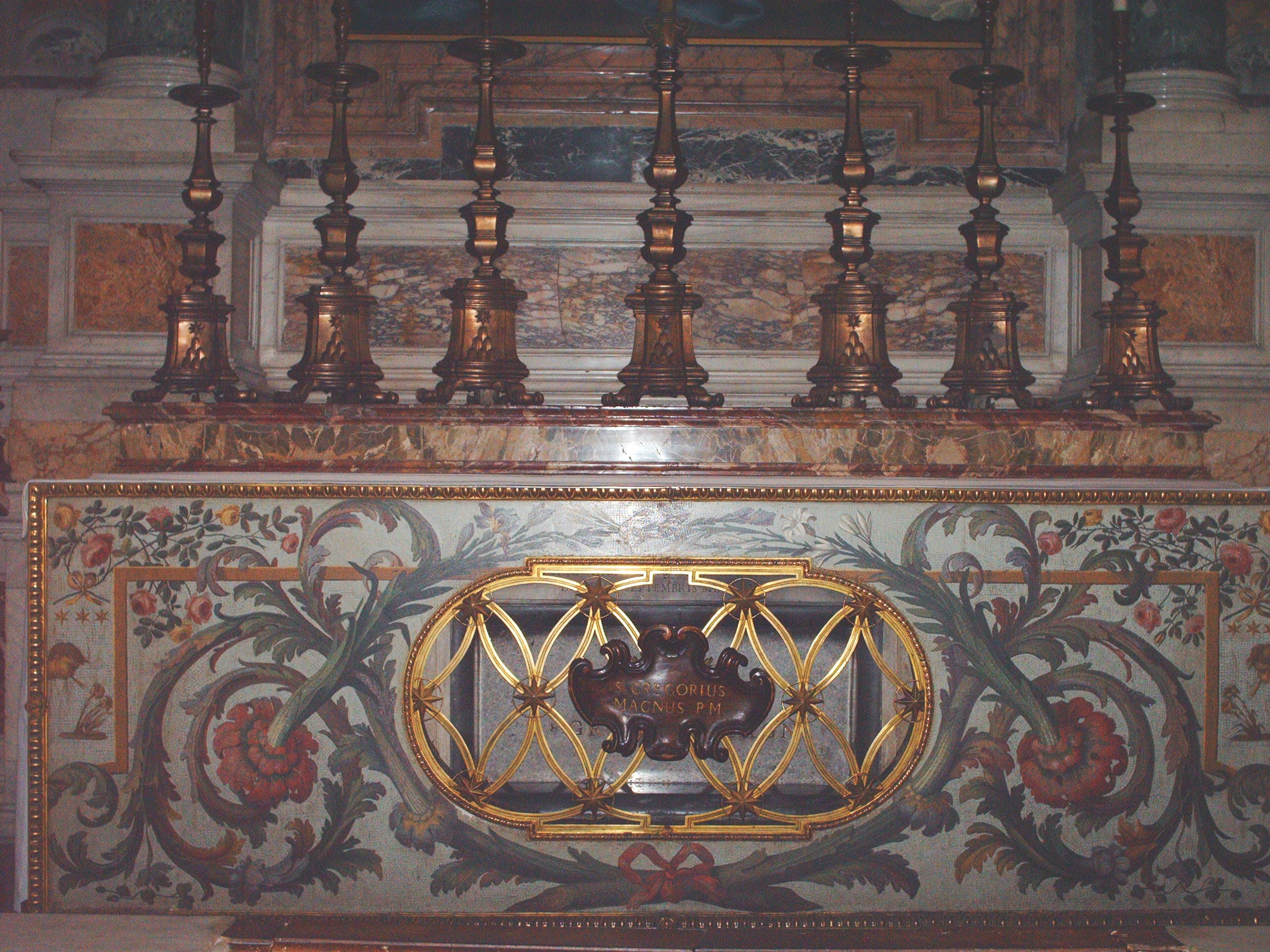 Tomb of pope Gregorius I, Basilica di San Pietro